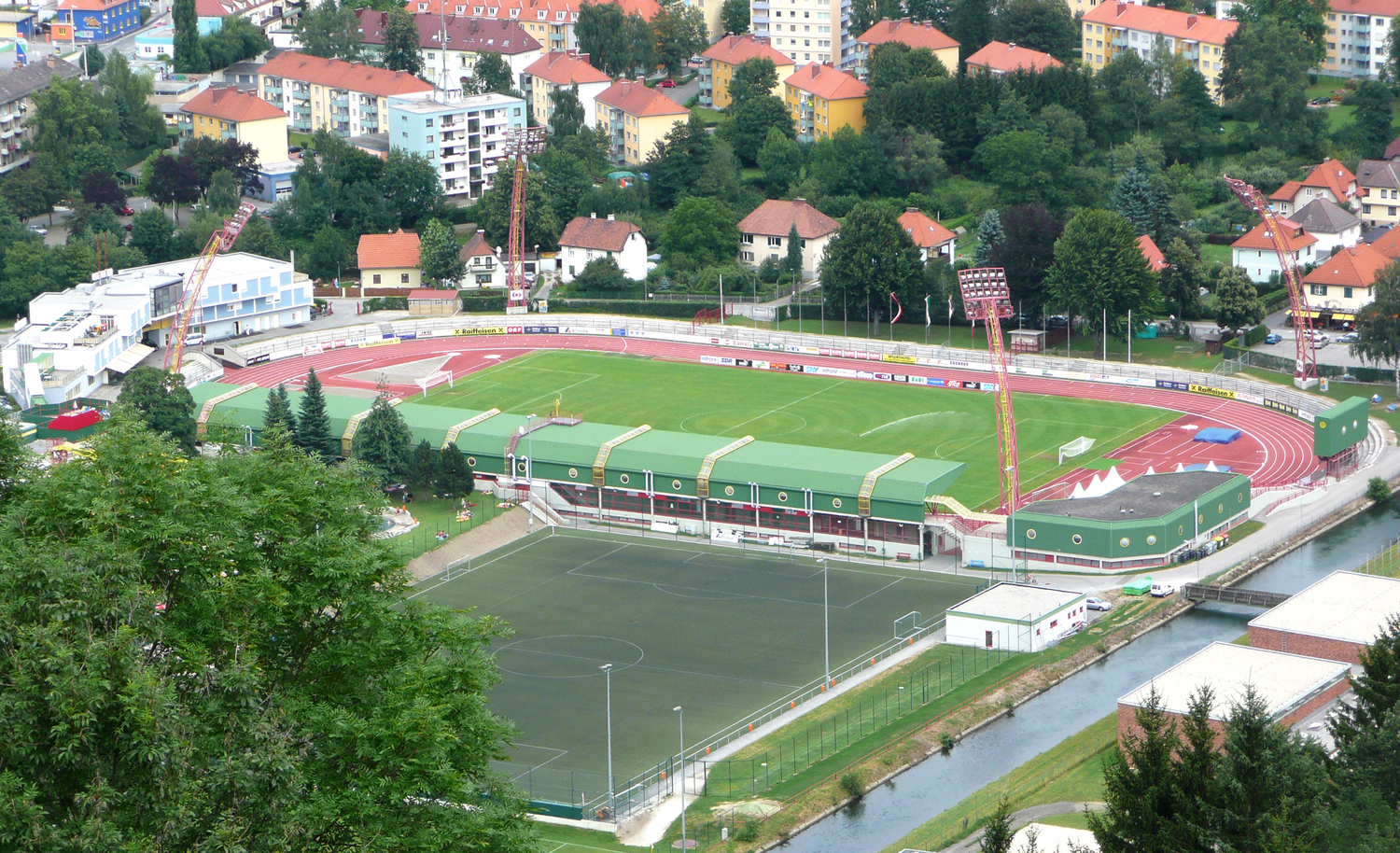 Franz-Fekete-Stadion Kapfenberg aus der Vogelperspektive